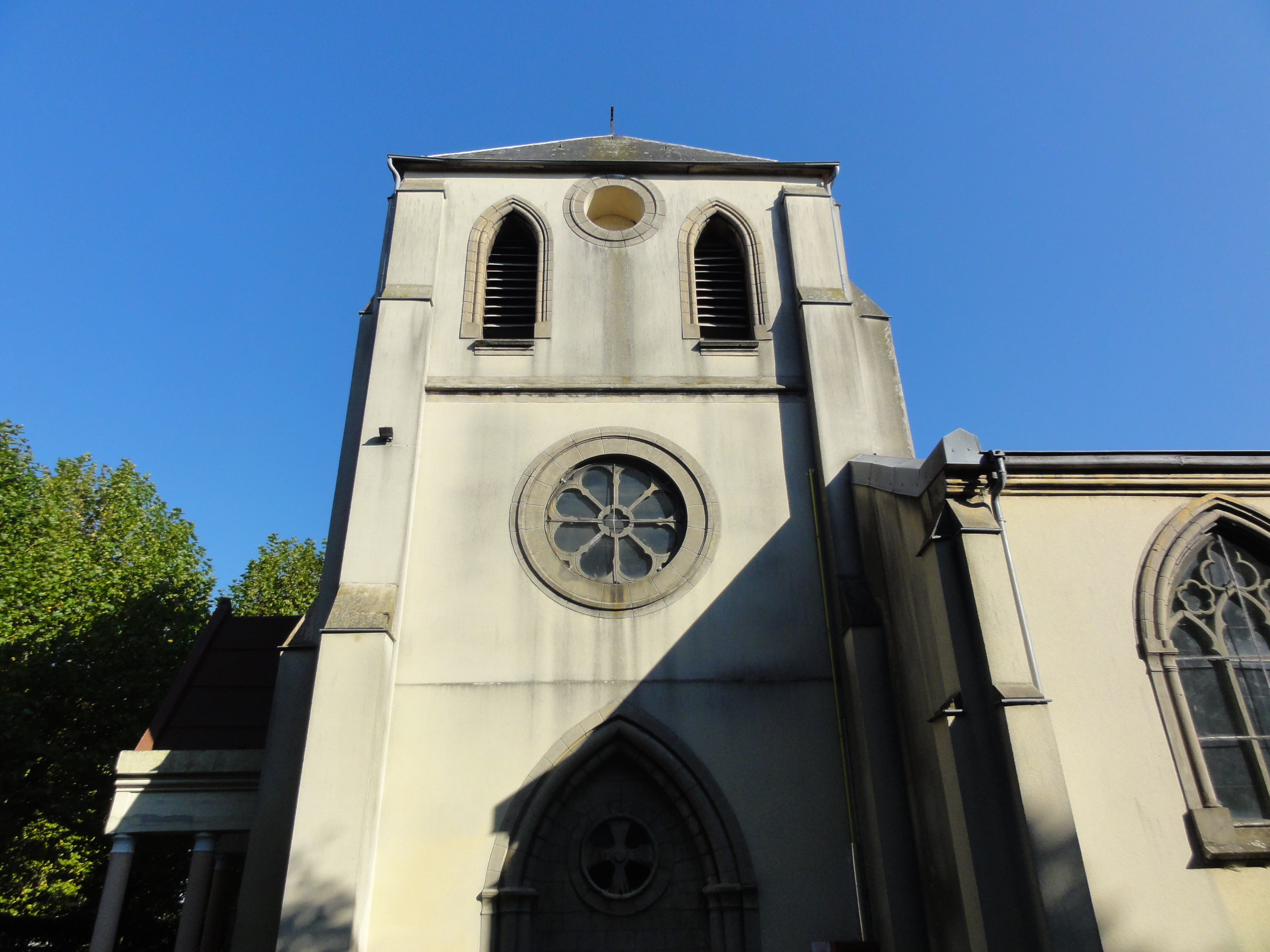 Église Saint-Joseph des cités de la Fosse n° 1 de la Compagnie des mines d'Ostricourt, Oignies, Pas-de-Calais, Nord-Pas-de-Calais, France.